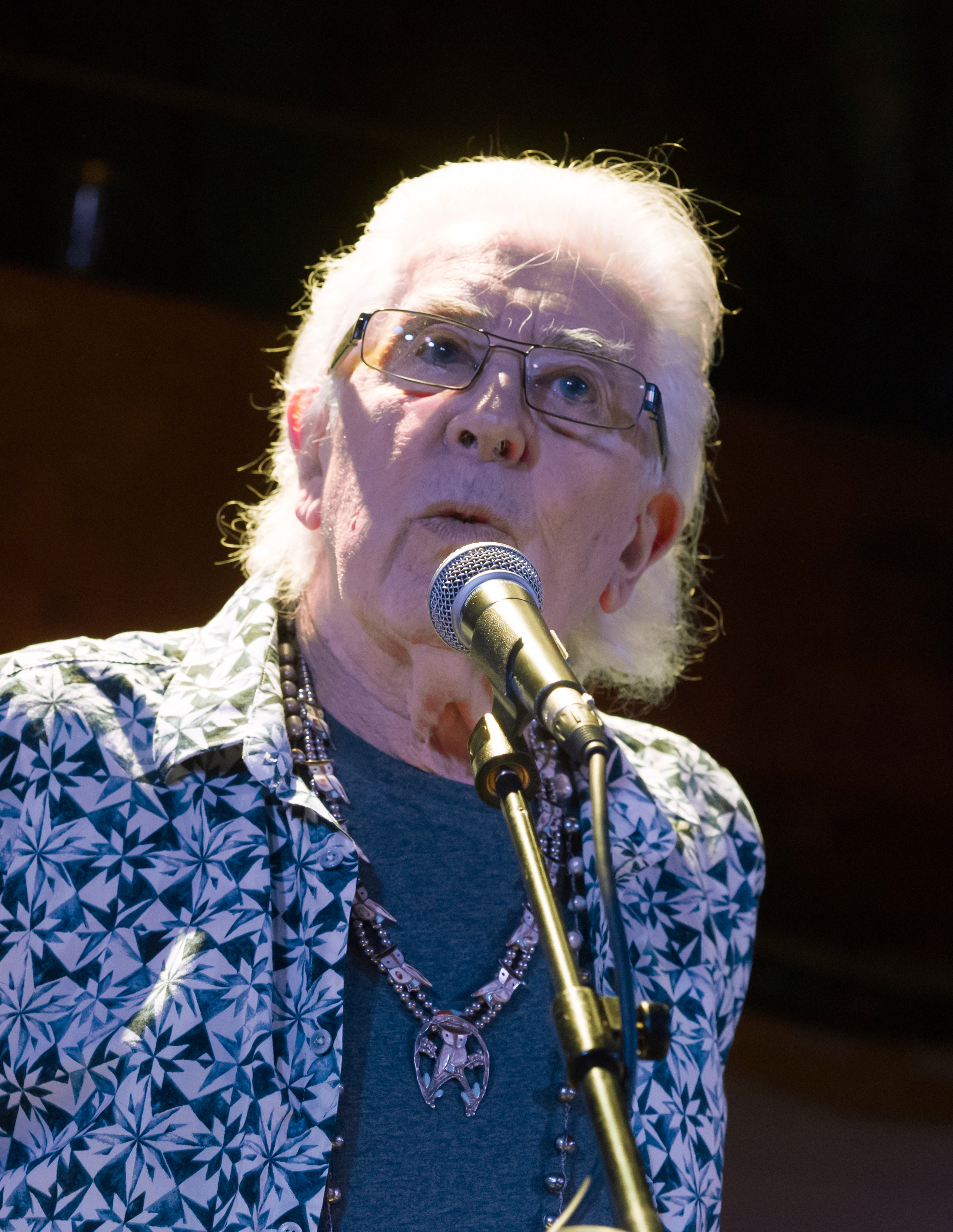 John Mayall in der Fabrik Hamburg 2017